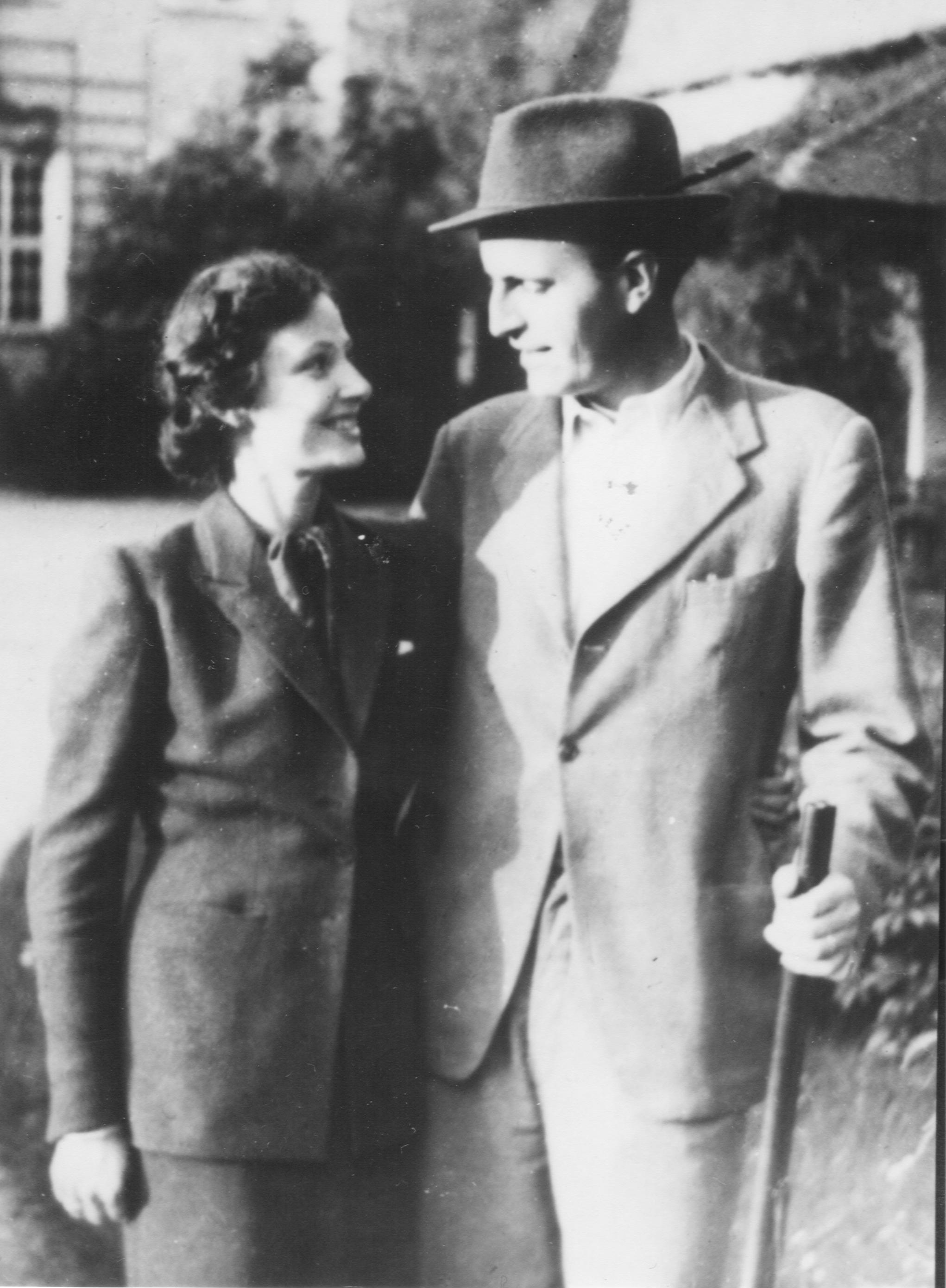 Von Trott et sa femme à la Pentecôte 1944